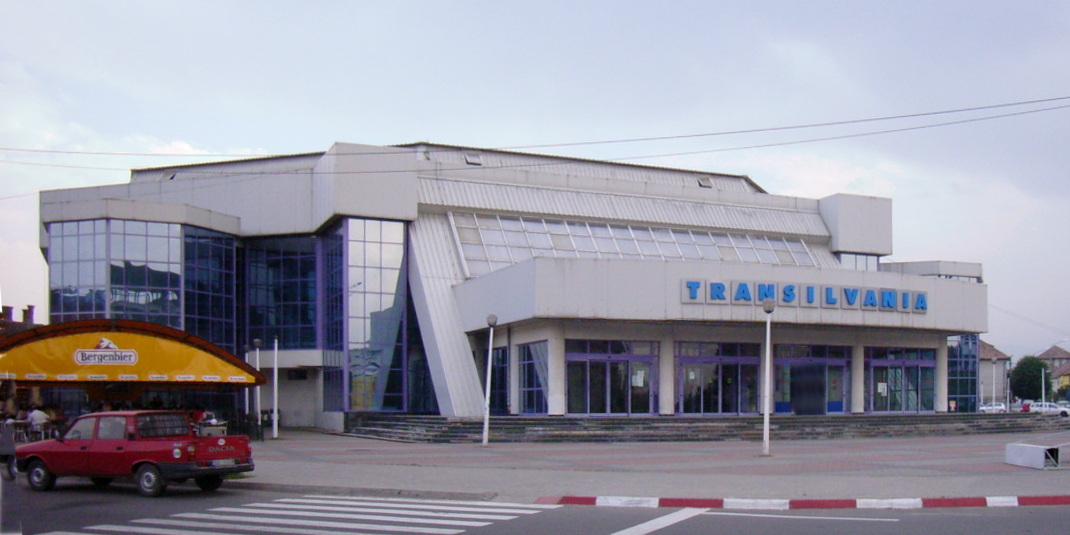 Hermannstadt, Mehrzweckhalle Transilvania.